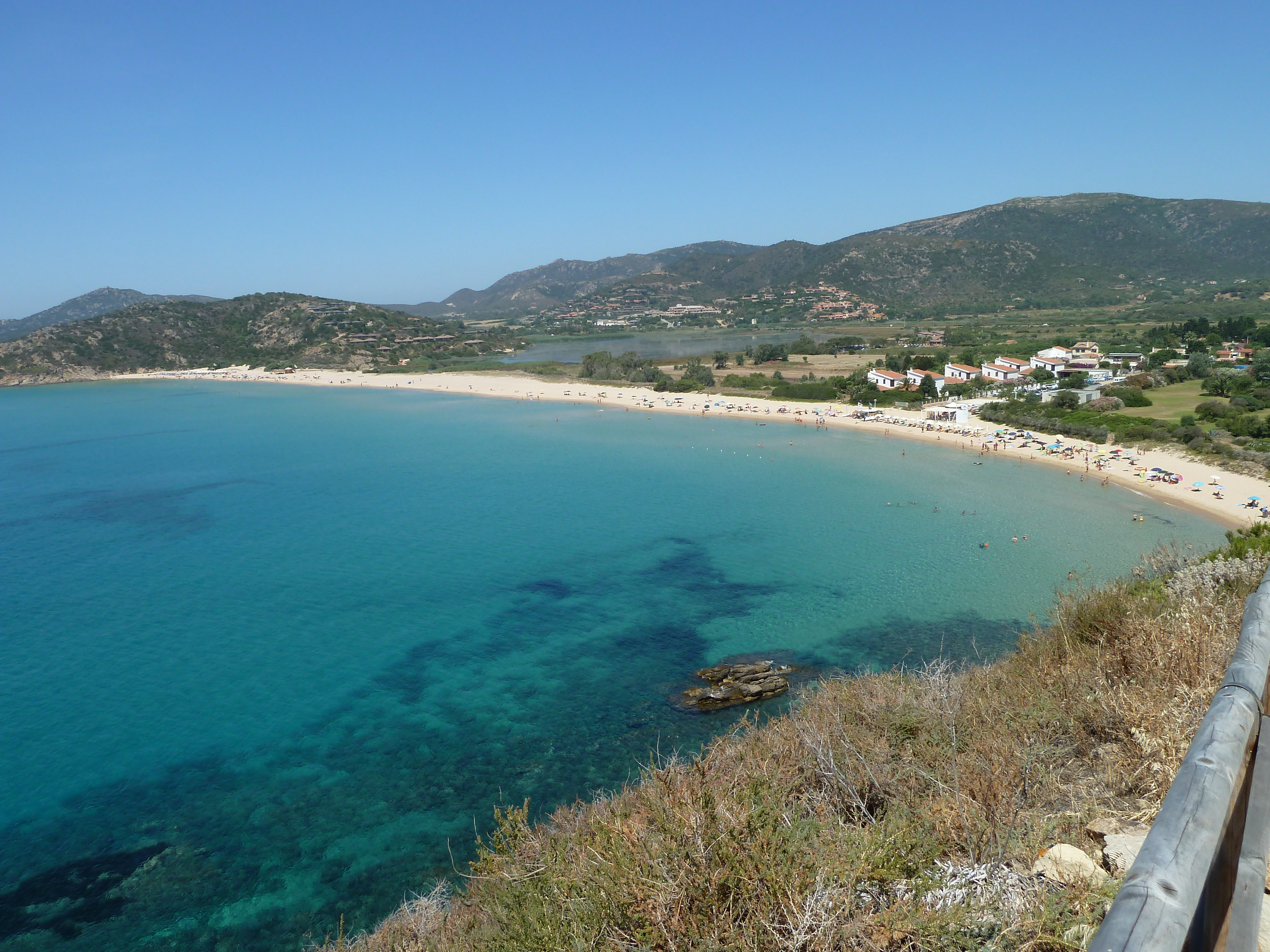 plages de chia